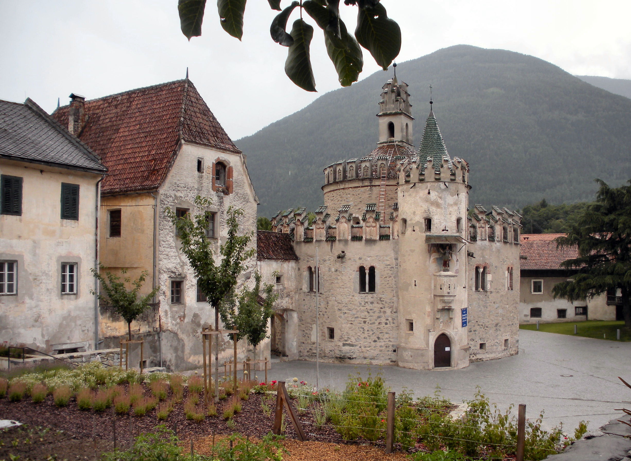 Abbazia di Novacella (Varna, BZ), San Michele (Engelsburg) Foto propria Luglio 2009 Object location 46° 44′ 32.43″ N, 11° 38′ 55.33″ E This and other images at their locations on: Google Maps - Google Earth - OpenStreetMap - Proximityrama(Info)